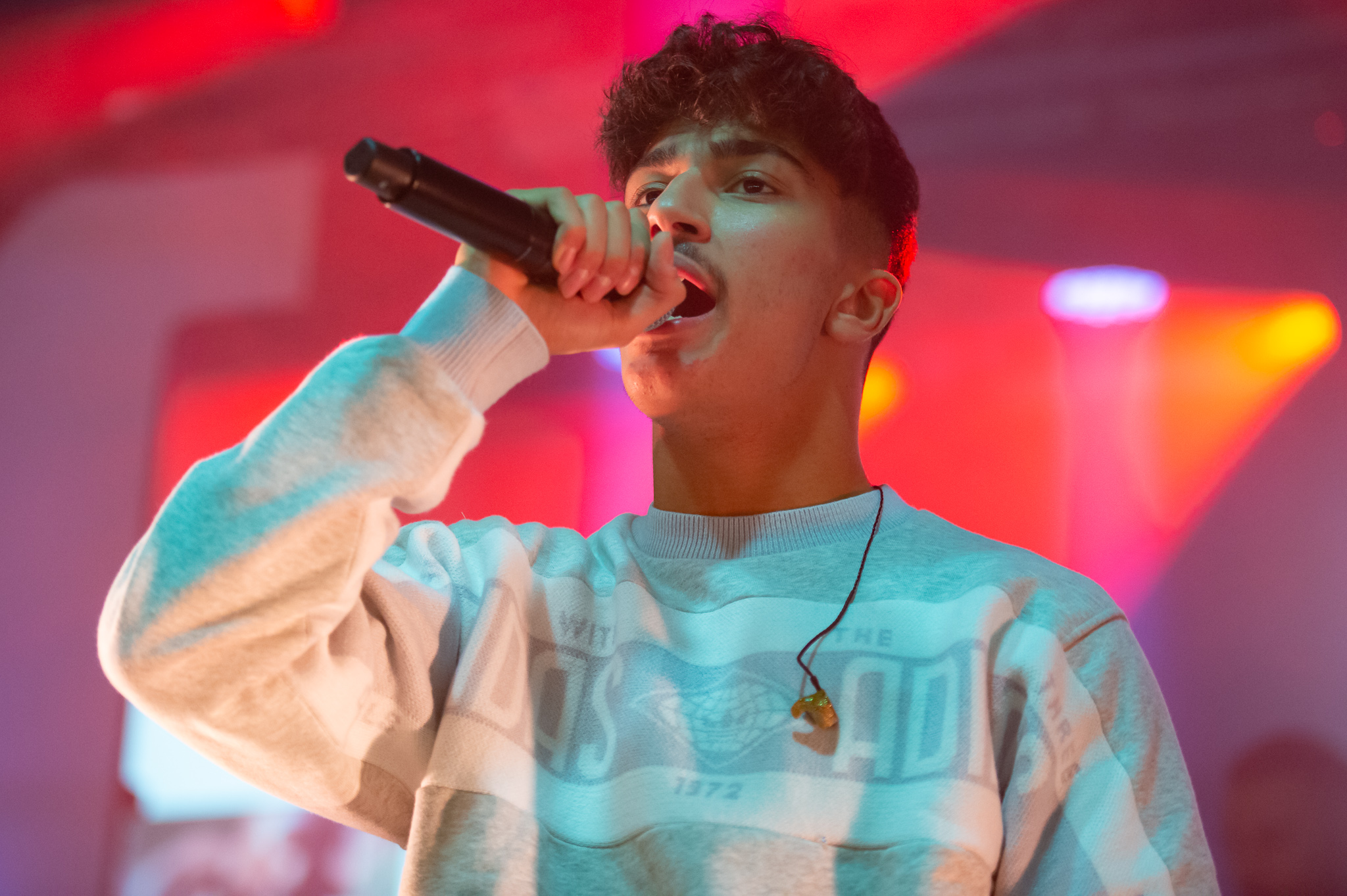 Concertbüro Franken,Konzert,Livekonzert,Livemusik,Löwensaal,Mero,Musik